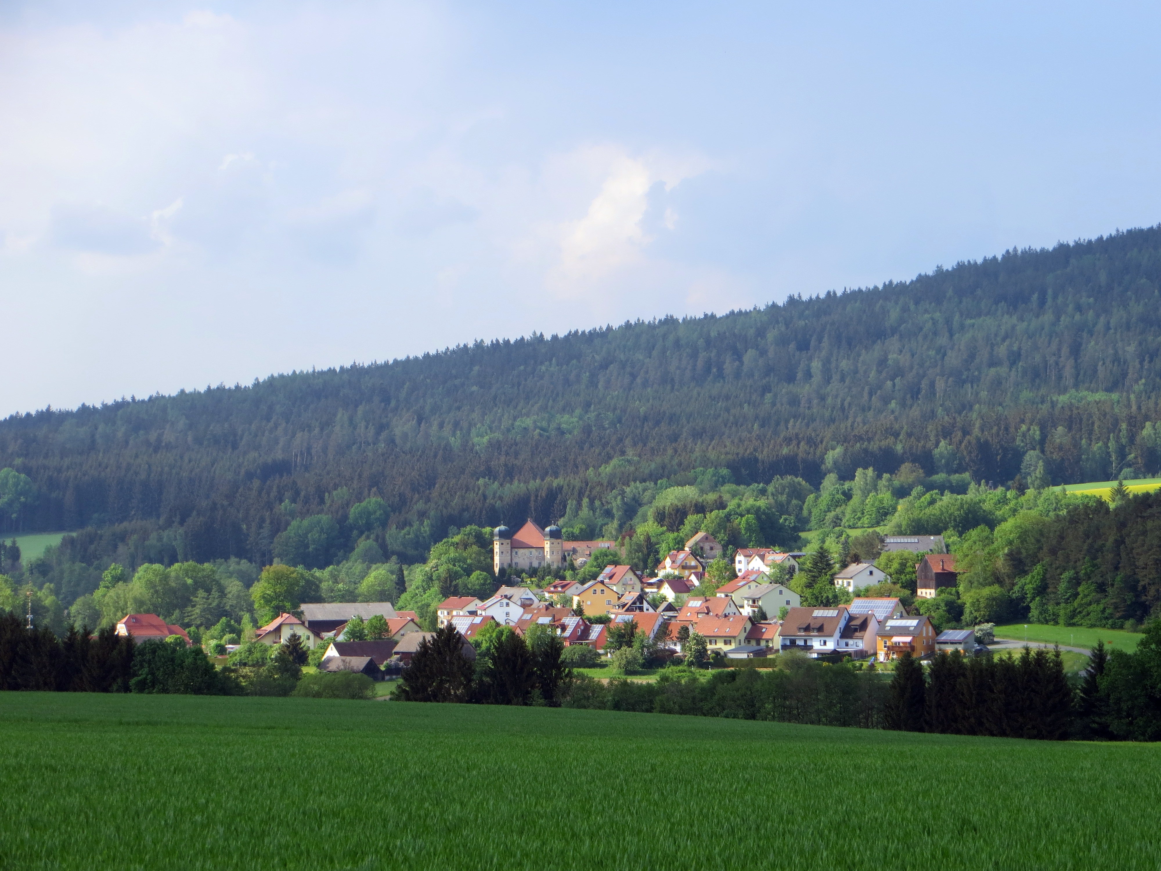 Blick auf Grötschenreuth mit Hammerschloss